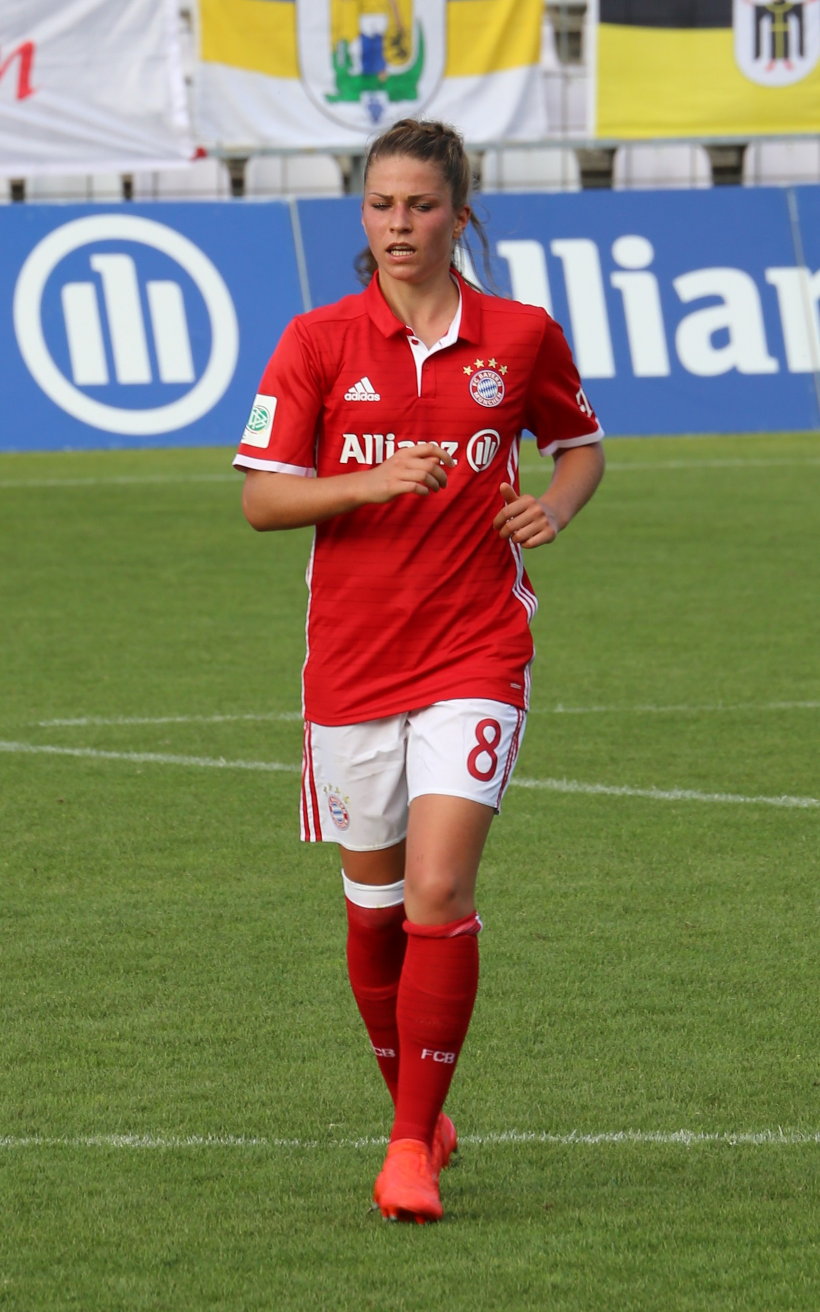 Melanie Leupolz, FC Bayern München, beim Frauen-Bundesliga-Spiel FC Bayern München gegen SC Freiburg am 3. September 2016 im Stadion an der Grünwalder Straße (Ergebnis war 1:1).